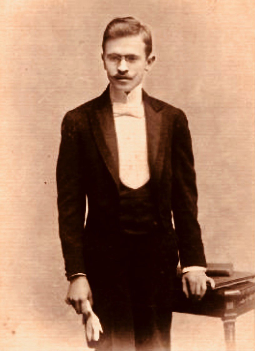 Karl Járay (1878–1947), Wiener Architekt, Bautechniker, Hochschullehrer und Mäzen